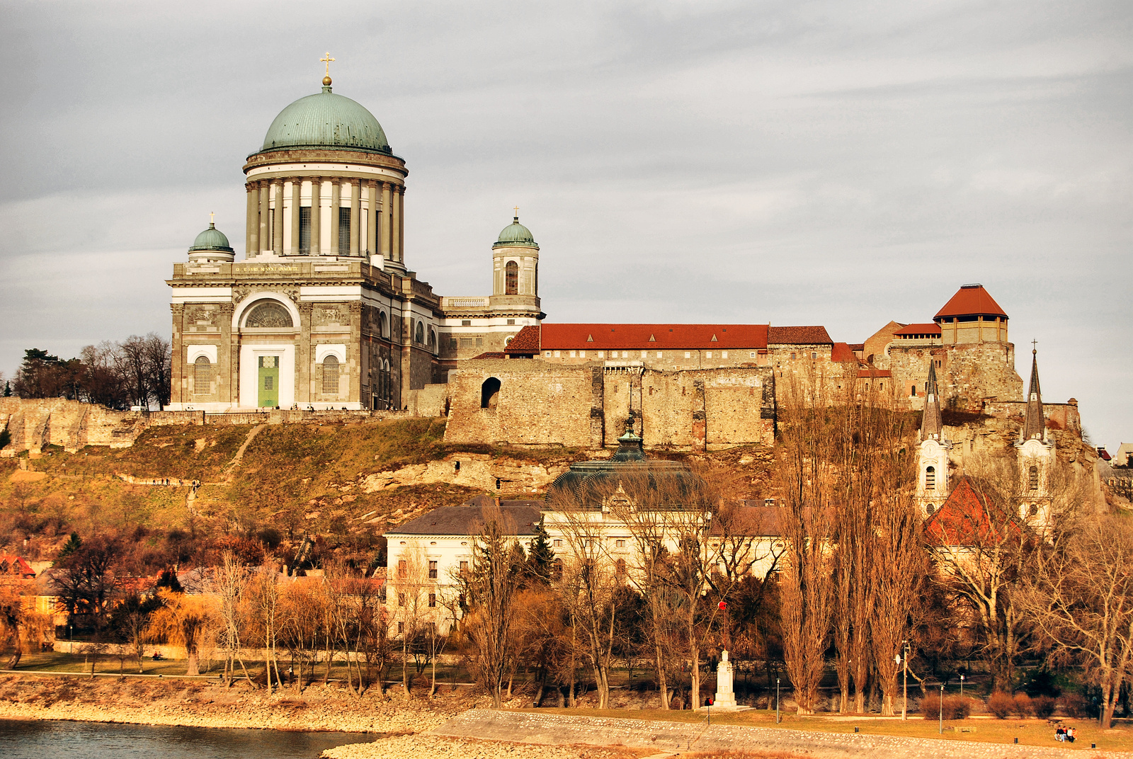 Főszékesegyház (Esztergom, Szent István tér) This is a photo of a monument in Hungary. Identifier: 6238